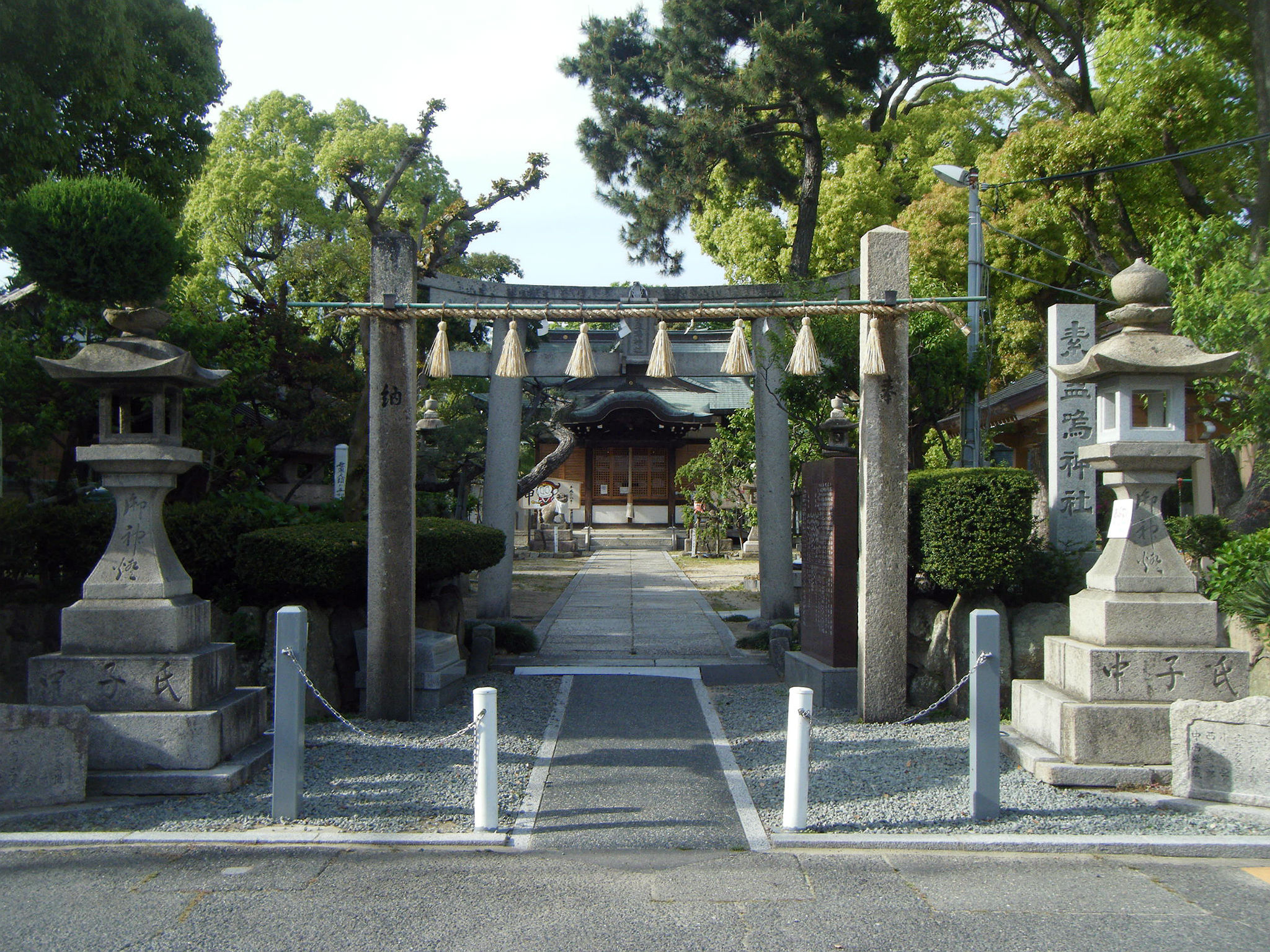 素盞嗚神社 兵庫県尼崎市大庄西町一丁目41-25